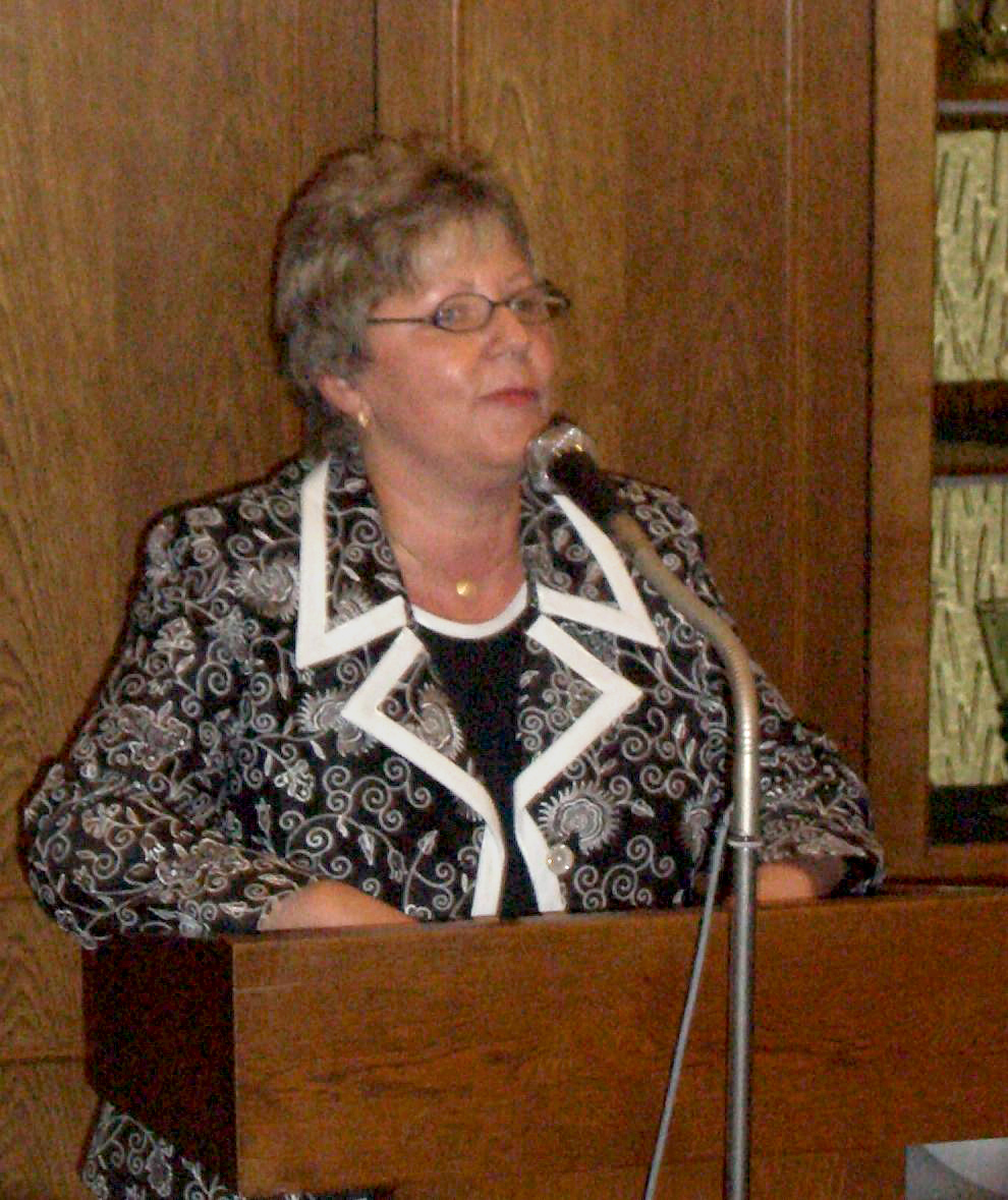 Marion Caspers-Merk an ihrem 50. Geburtstag in der Bezirkskellerei Efringen-Kirchen